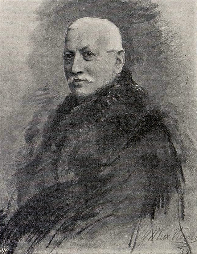 Max Koner: Mendelsohn (unvollendet)', 1884